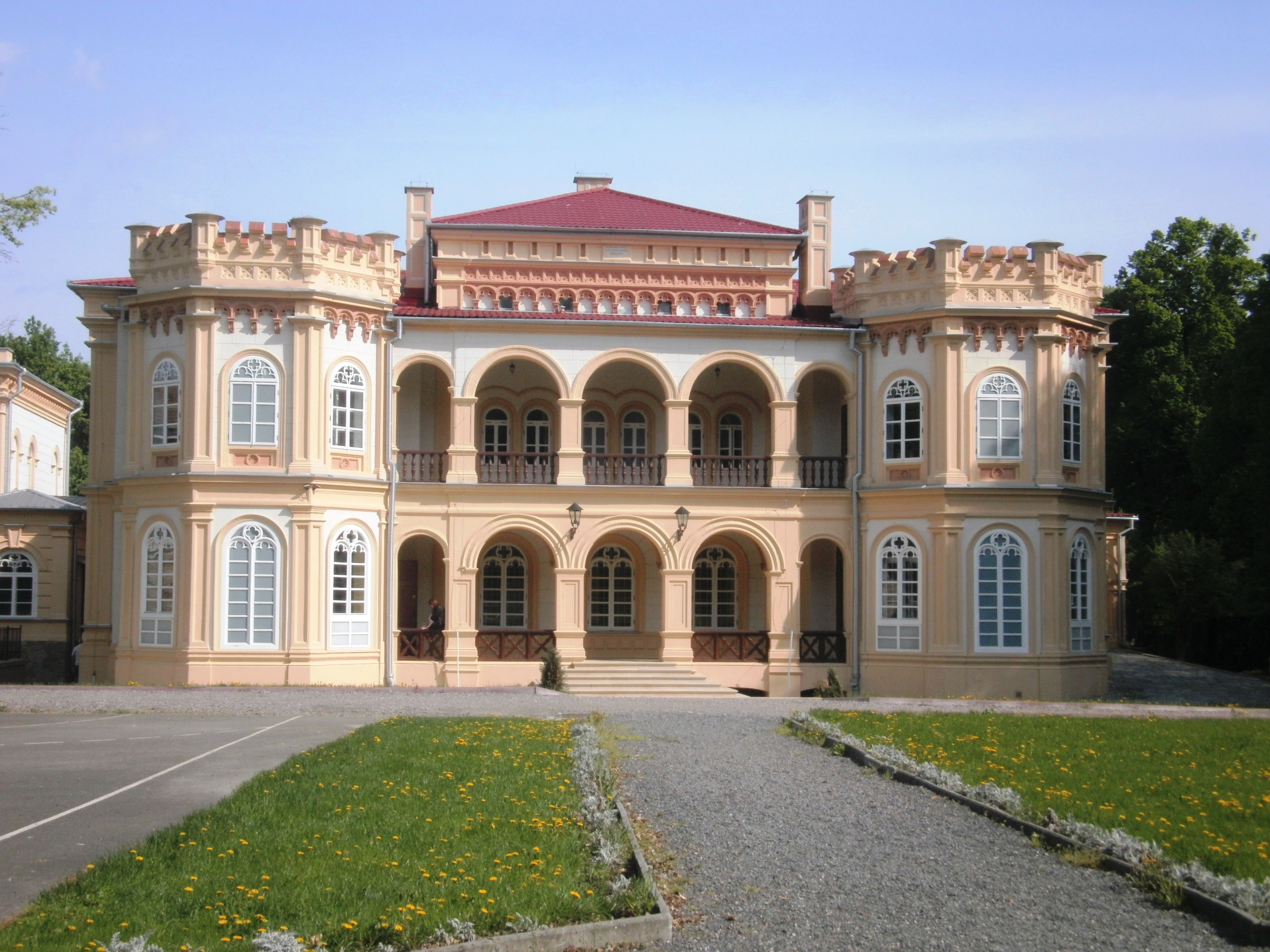 Tyczyn, pałac, 1862-1870, 1892